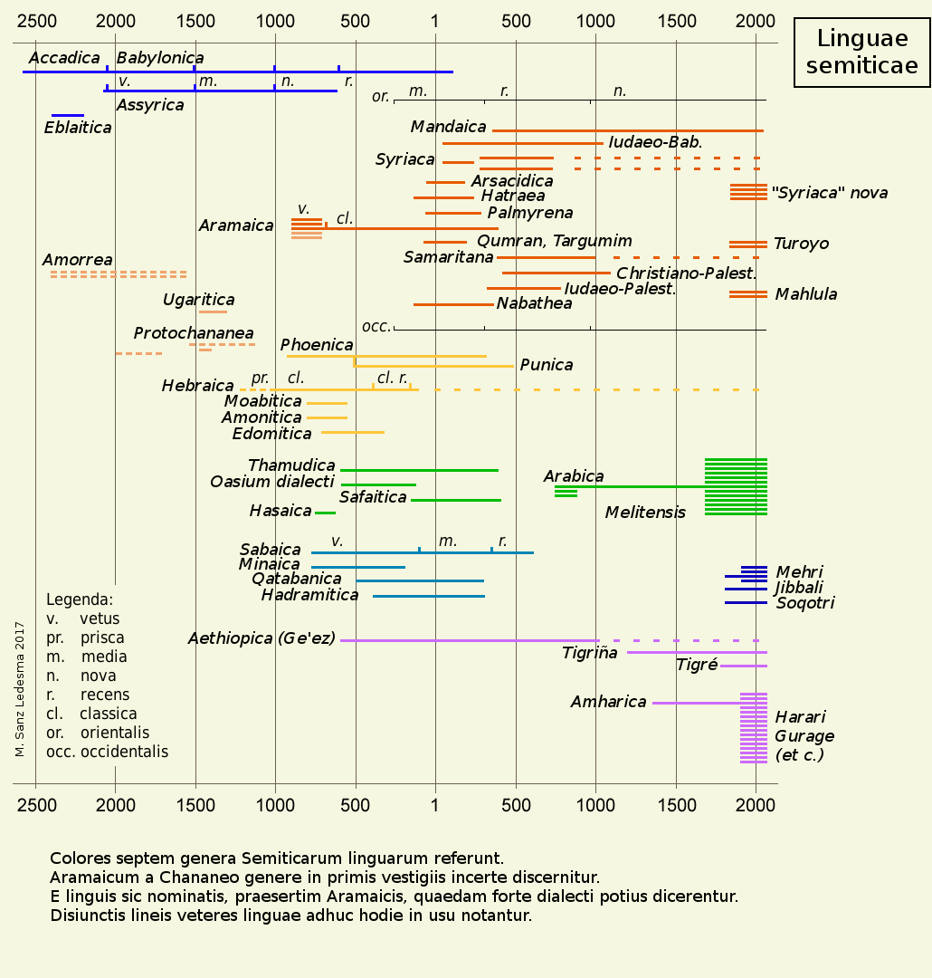 Chronologia Semiticarum Linguarum